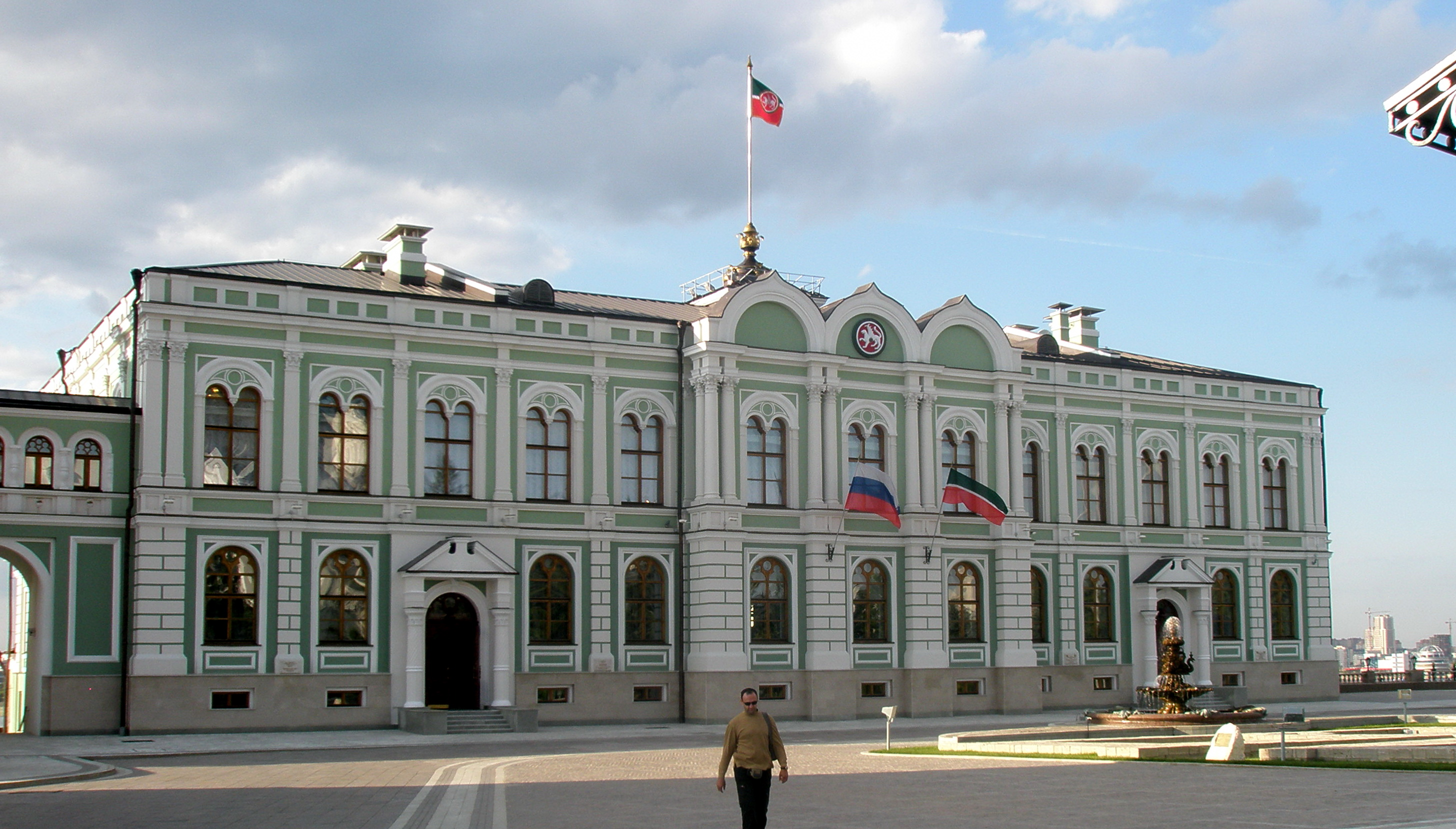 Губернаторский дворец (Казань). В настоящее время - Президентский дворец.